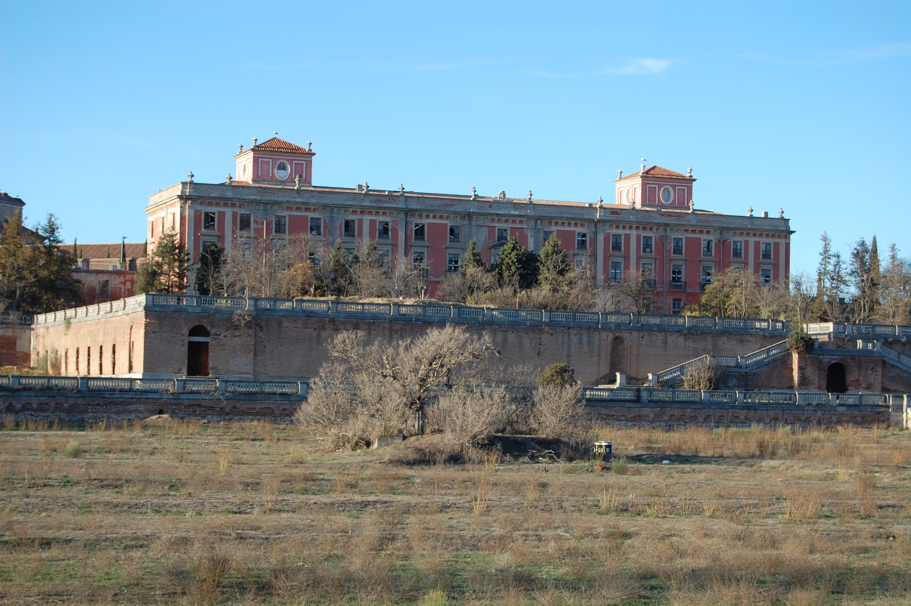 Palacio del infante don Luis en Boadilla del Monte (Madrid, España), obra de Ventura Rodríguez.